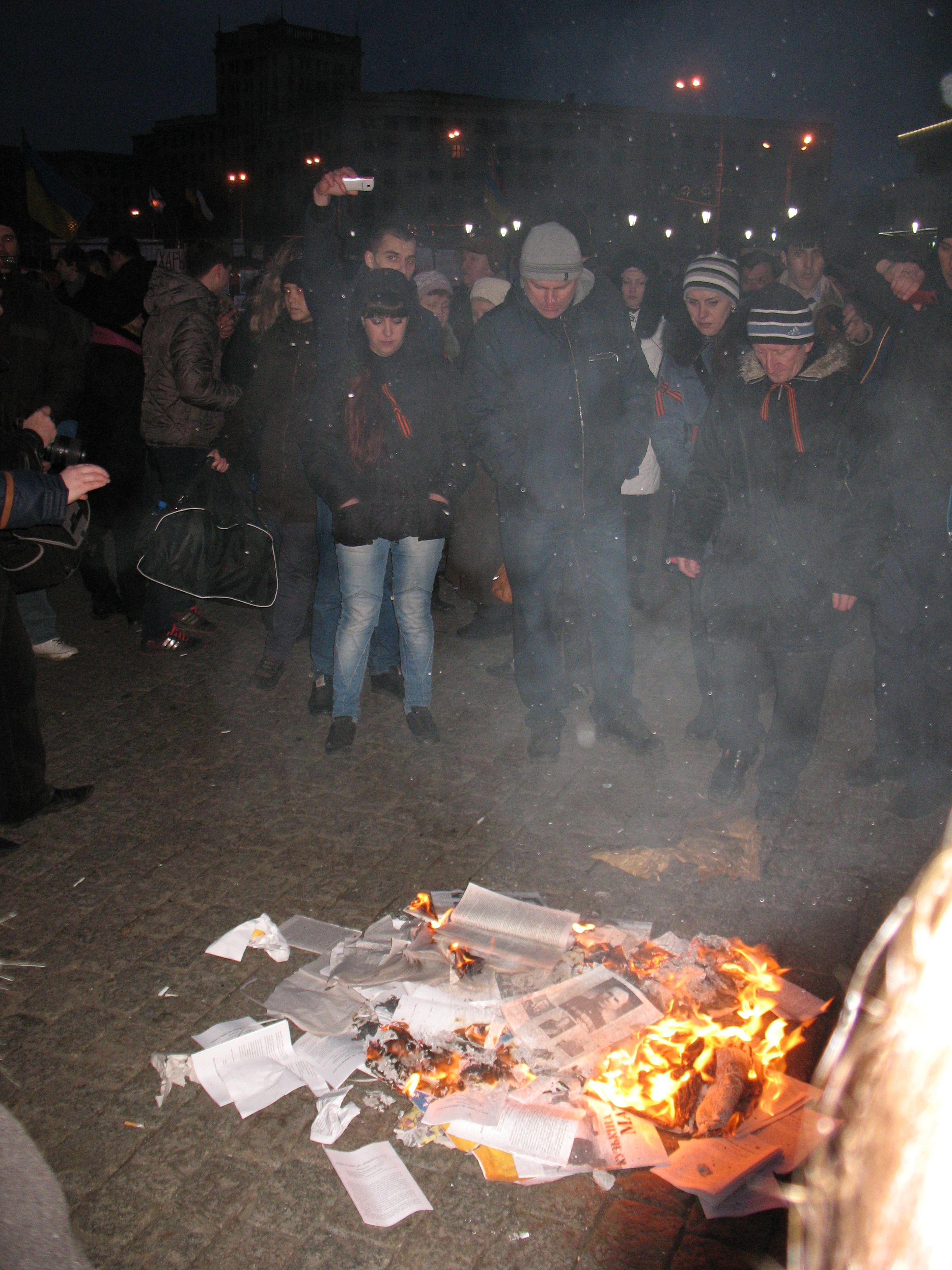 Харьков, площадь Свободы. Вечер 1 марта. Сжигание националистической литературы и плакатов "Правого сектора" из только что освобождённого от "Правого сектора" здания обладминистрации.